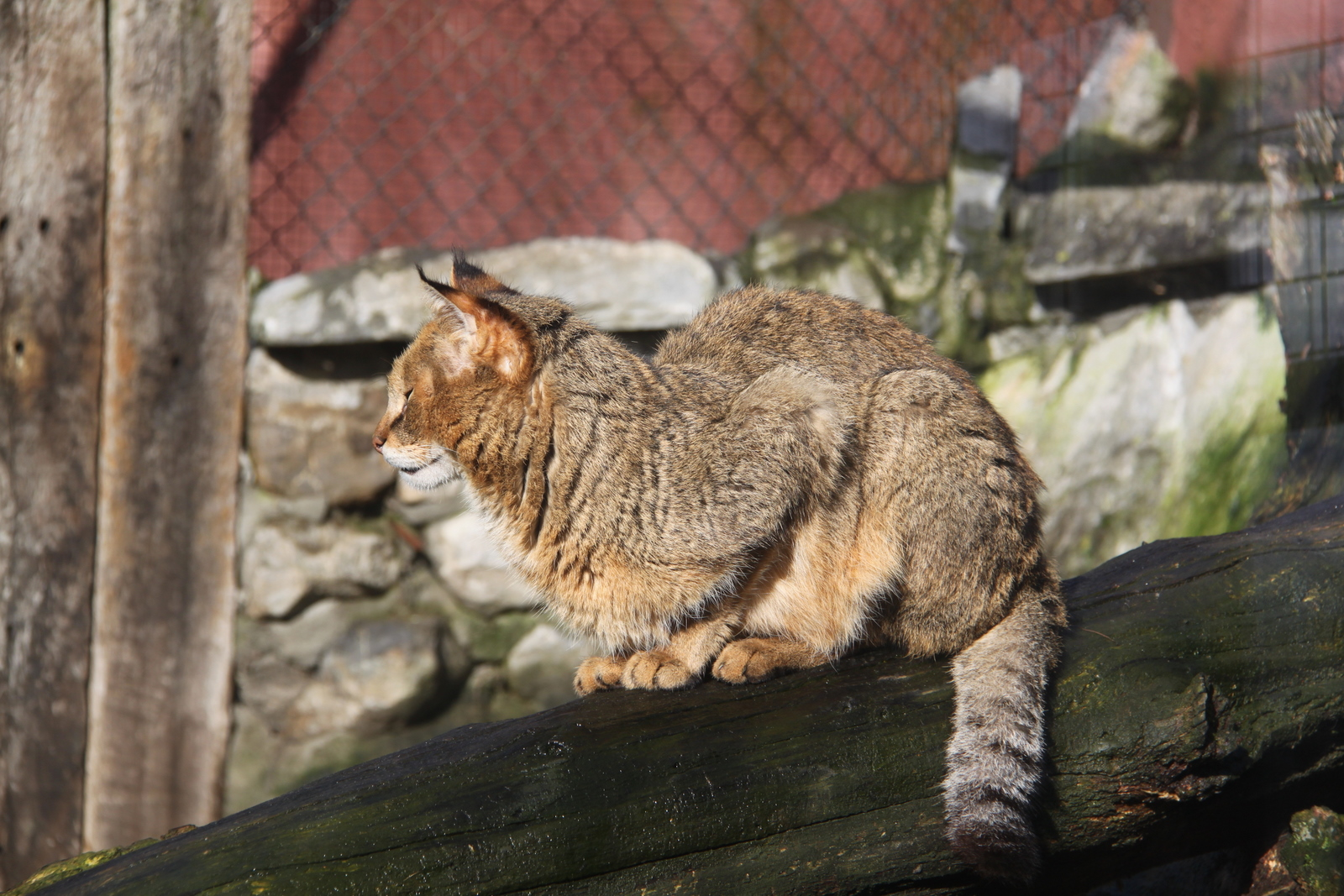 20120219 Olmense Zoo